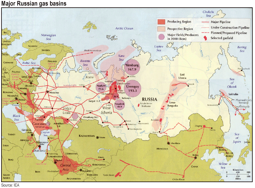 Major Russian gas basins